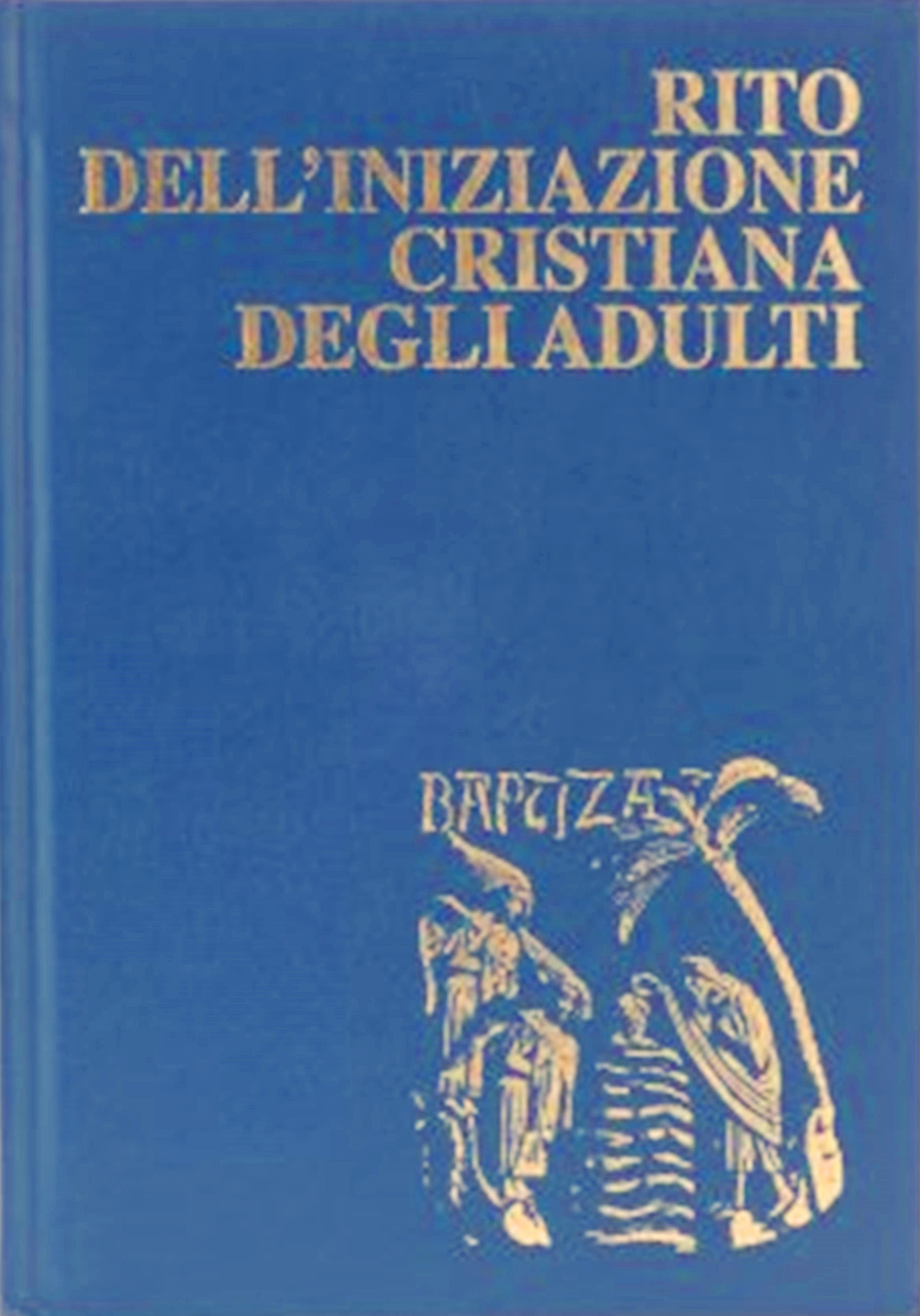 Frontespizio del Libro del Rito dell’iniziazione cristiana degli adulti